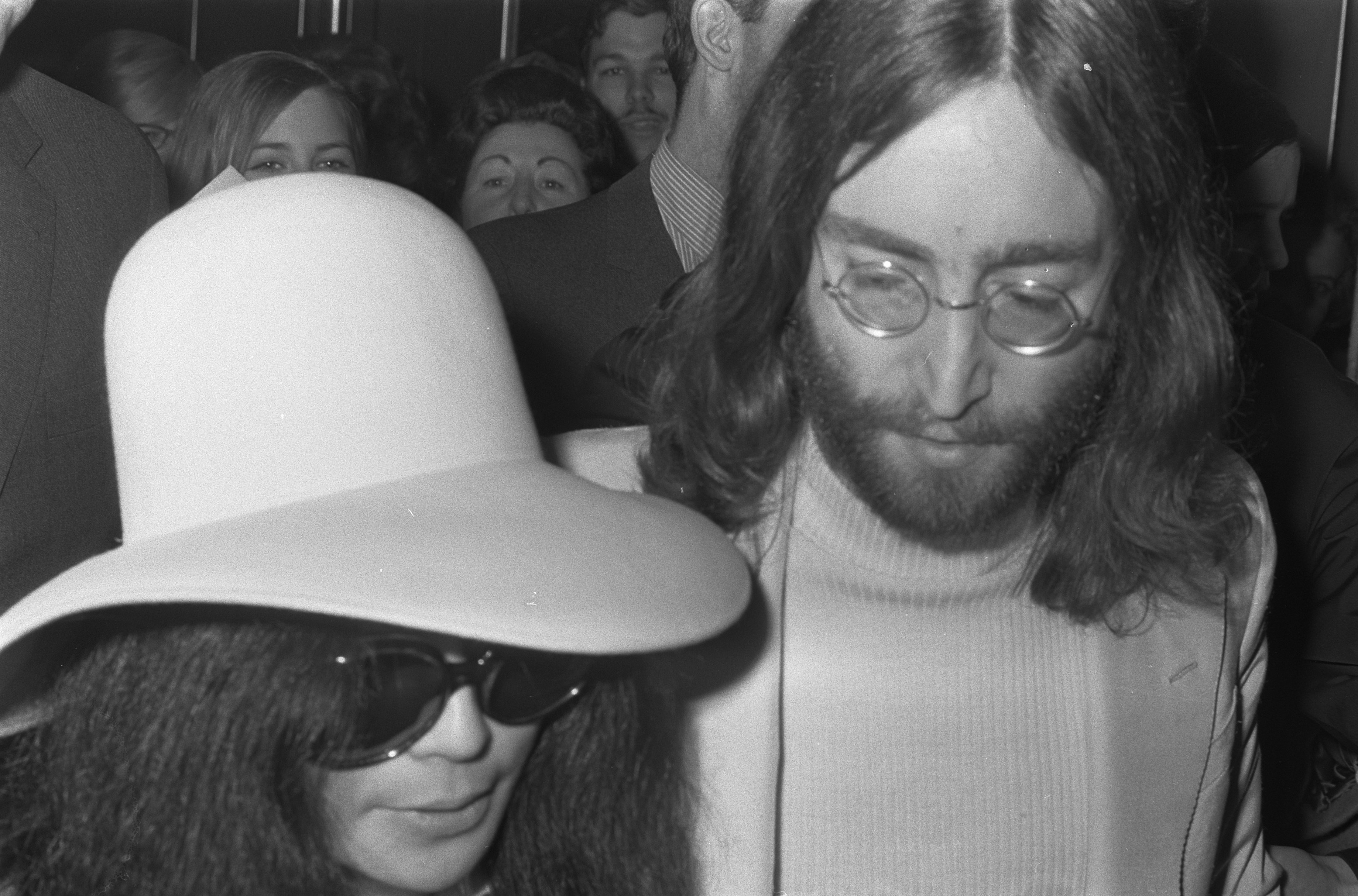 Collectie / Archief : Fotocollectie Anefo Reportage / Serie : [ onbekend ] Beschrijving : John Lennon en echtgenote Yoko Ono verlaten het Hilton Hotel te Amsterdam Datum : 31 maart 1969 Locatie : Amsterdam, Noord-Holland Trefwoorden : aankomst en vertrek, echtparen, musici Persoonsnaam : Lennon, John, Ono, Yoko Fotograaf : Koch, Eric / Anefo Auteursrechthebbende : Nationaal Archief Materiaalsoort : Negatief (zwart/wit) Nummer archiefinventaris : bekijk toegang 2.24.01.05 Bestanddeelnummer : 922-2491